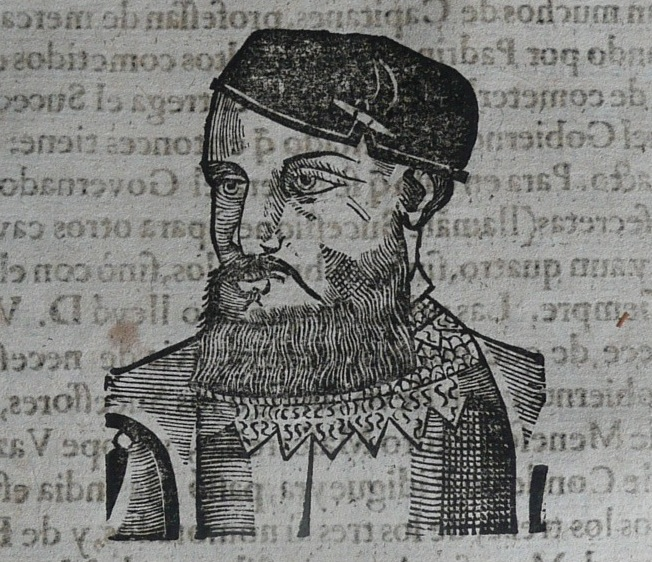 portrait of D. Duarte de Meneses